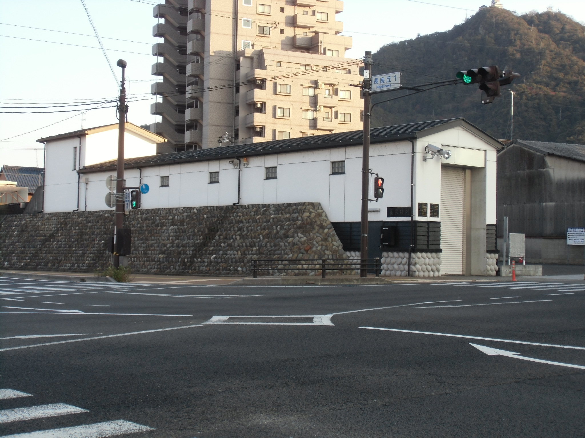 長良陸閘（長良橋陸閘）。岐阜県岐阜市で撮影